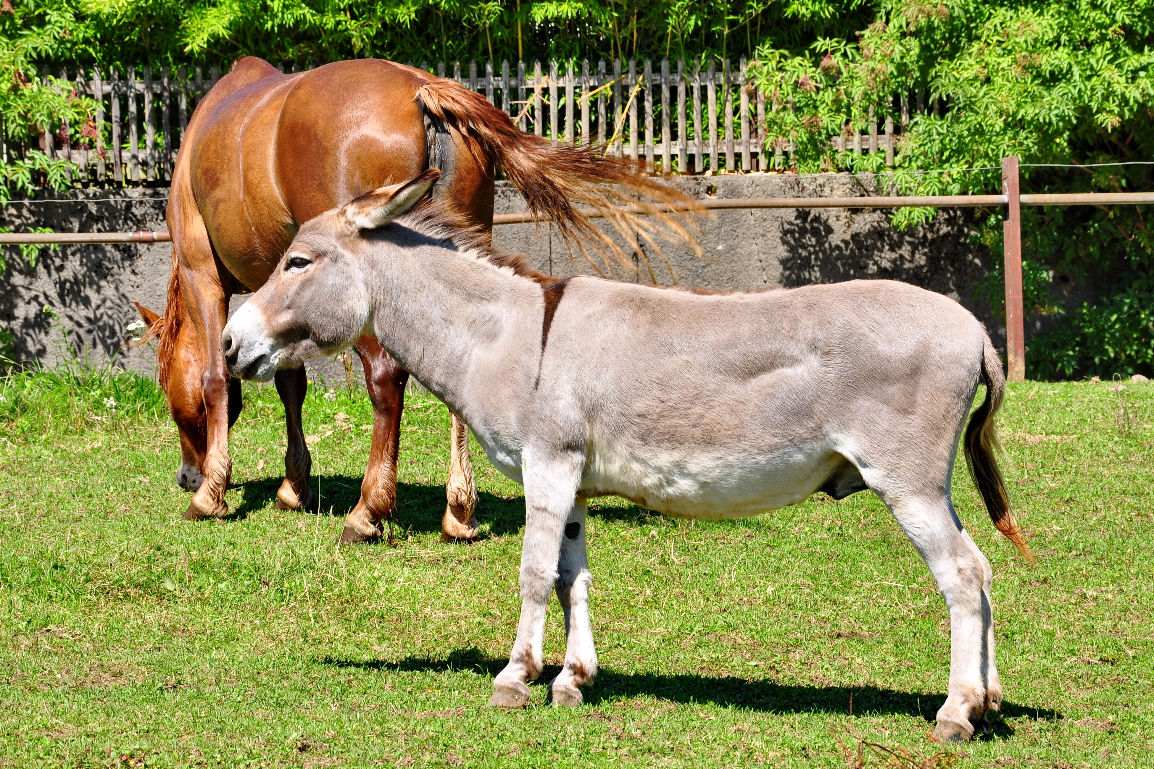 Gut Katzensee in Regensdorf (Switzerland)